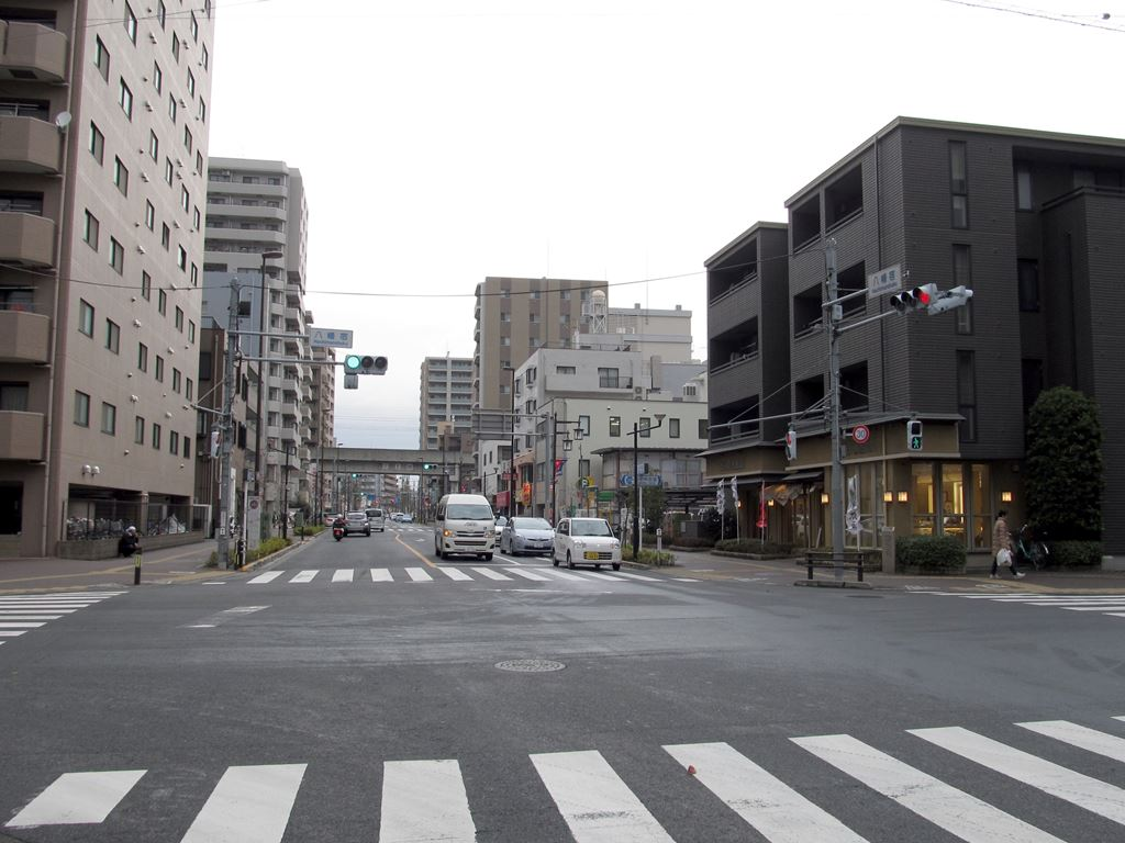 東京都府中市八幡省。旧甲州街道。小金井街道（新小金井街道）。東京都道15号府中清瀬線起点、八幡町交差点。